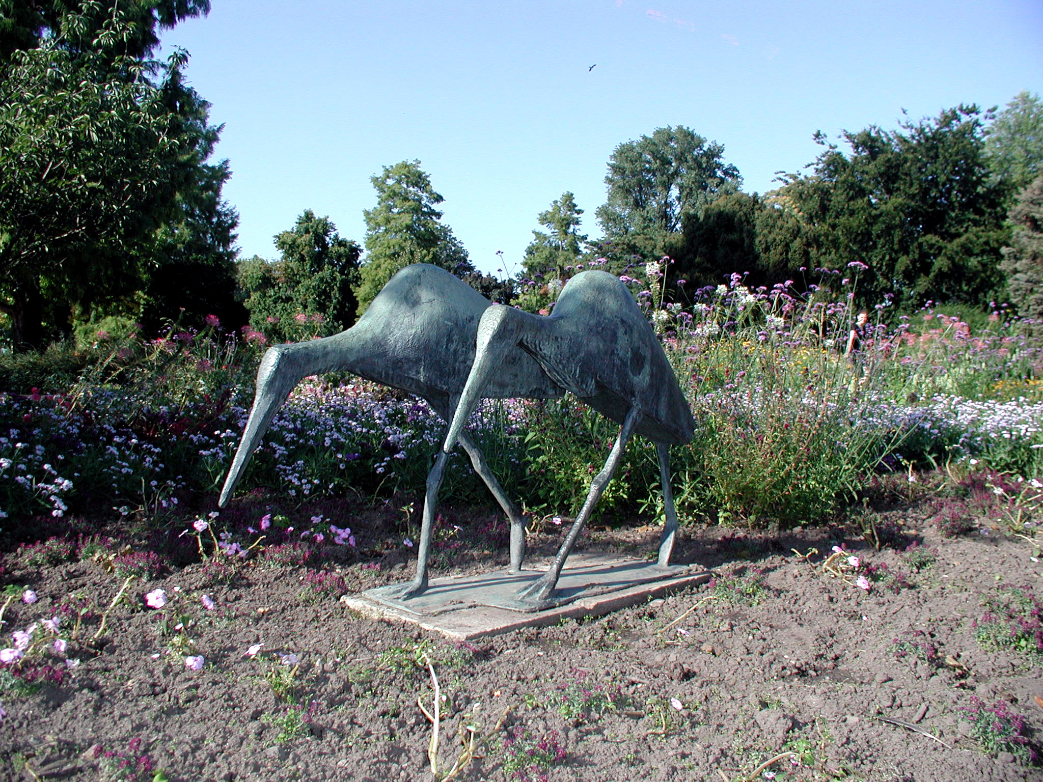 Skulptur "Zwei Störche" von Philipp Harth, im Kölner Rheinpark